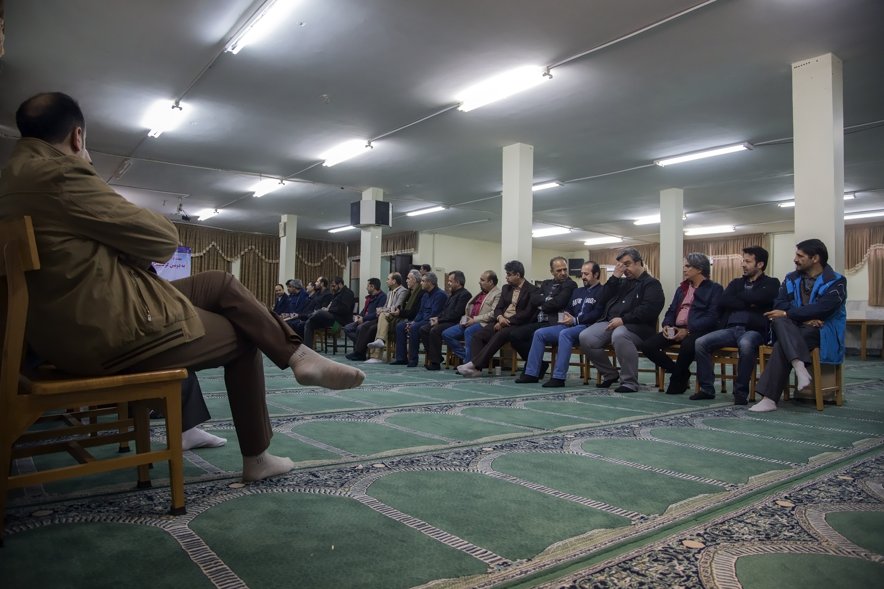 دومین همایش دانش آموختگان دبیرستان صدر